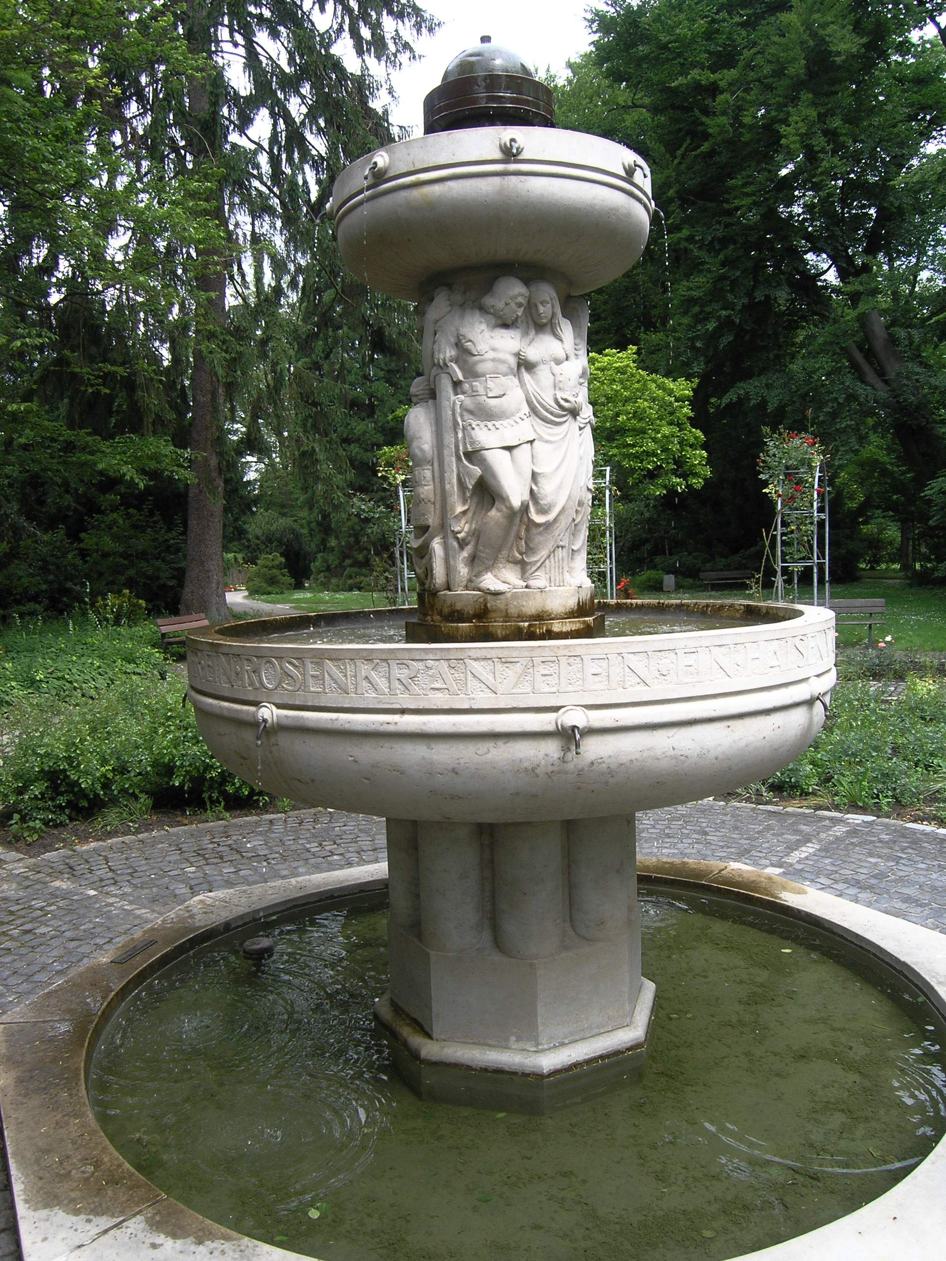 Nibelungenbrunnen, Karlsruhe-Durlach